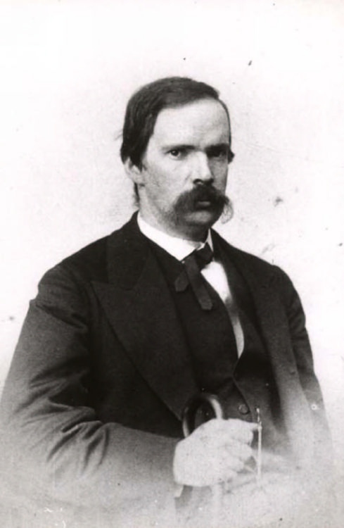 Diego Jacinto Agustín Barros Arana (* 16 de agosto de 1830, Santiago - † 4 de noviembre de 1907, Santiago) pedagogo, diplomático e historiador chileno del siglo XIX, sus obras aun tienen vigencia, especialmente su "Historia General de Chile".